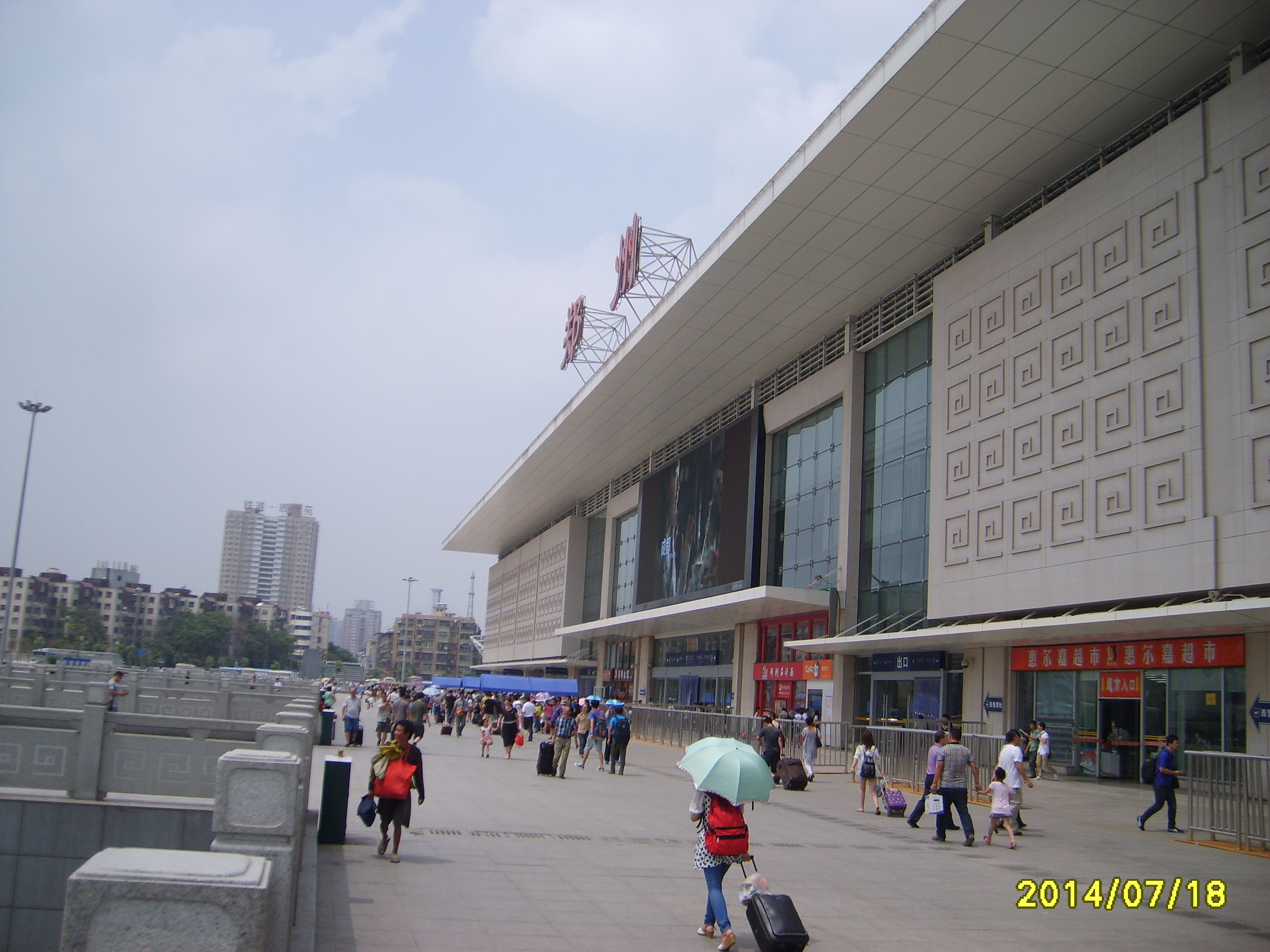 郑州火车站